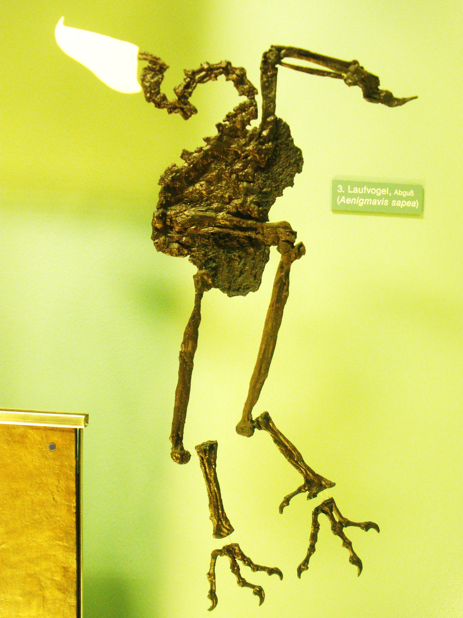 Fossil of Aenigmavis=Strigogyps[1], an extinct bird- Took the photo at Senckenberg Museum of Frankfurt